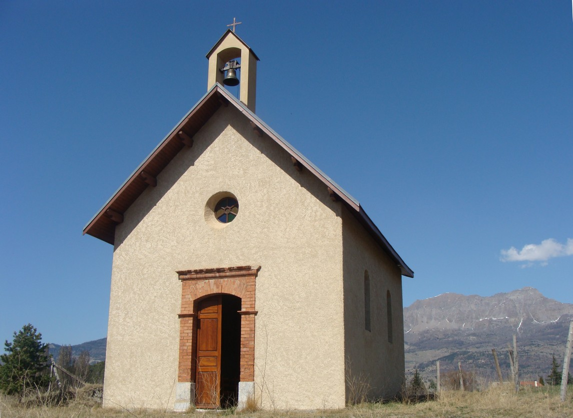 La chapelle des Chaussins, commune de Chorges (Hautes-Alpes), vue de l'extérieur.